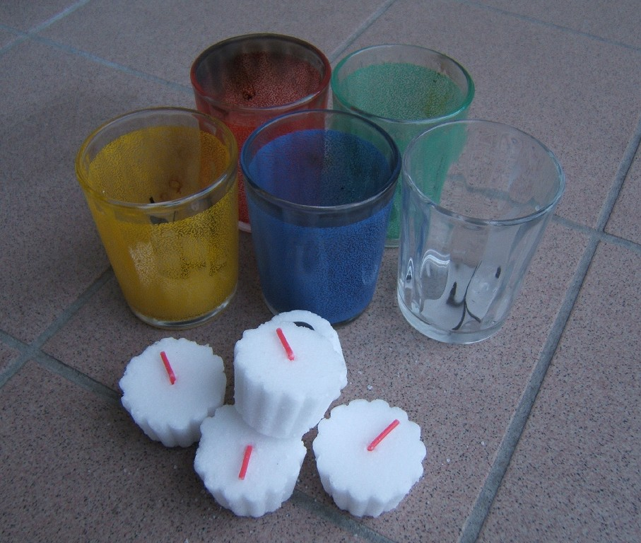 Lumignons pour la Fête des Lumières